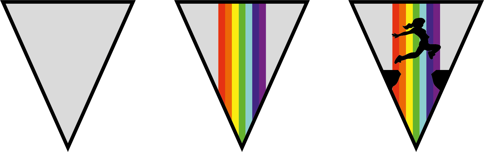 В залежності від ступеня, членкиня куреня отримує певний шеврон.